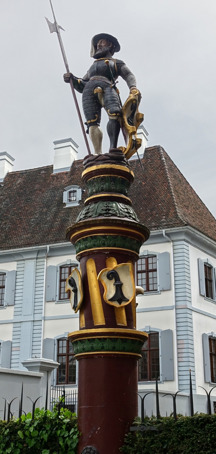 Sevogelbrunnen mit Kriegerfigur, Martinskirchhof beim Staatsarchiv Basel-Stadt von Hans Dobel (1523–1557) Bildhauer Ab dem 19. Jahrhundert ist die Bezeichnung "Sevogelbrunnen" belegbar. Damit wurde der Krieger fälschlicherweise als Henman Sevogel betrachtet, Hauptmann der Baselbieter Mannschaft, der in der Schlacht von St.Jakob am 25. August 1444 den Tod fand. Der Name blieb am Brunnen haften. Der Brunnstock indes, wechselte seinen Standort, als der Brunnen am Kornmarkt 1888 abgebaut wurde.